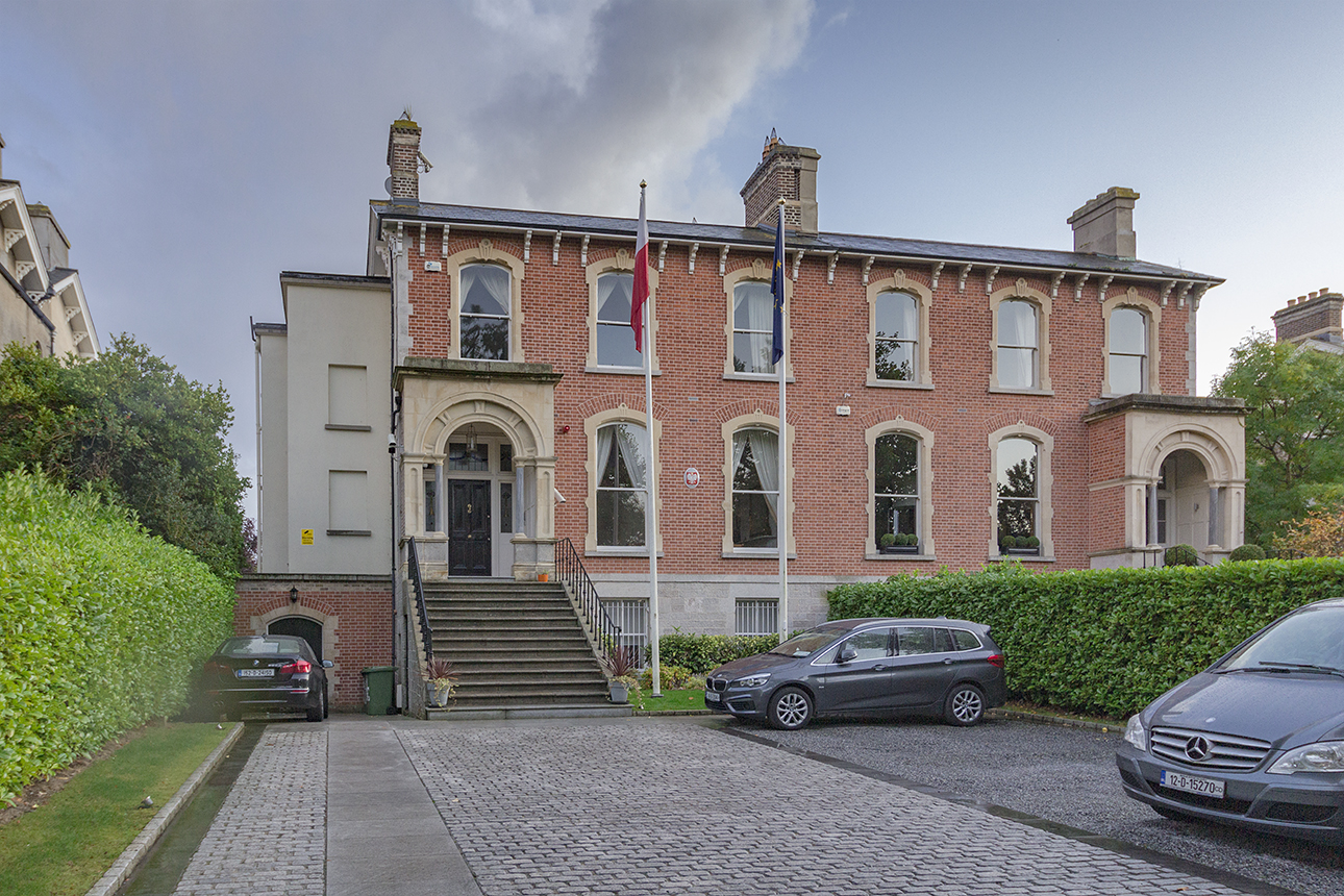 Ambasada RP w Dublinie